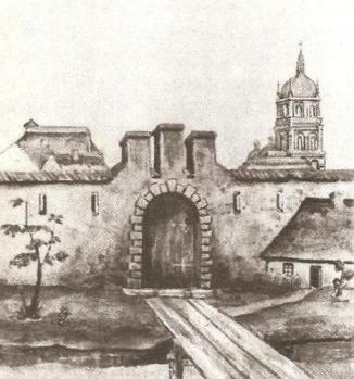 брамка зовнішньої частини хвіртки: брамка на ескарповому мурі